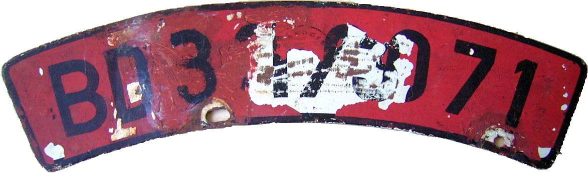 Vorderes Motorrad-Kennzeichen Französische Besatzungszone Baden 1945-1949